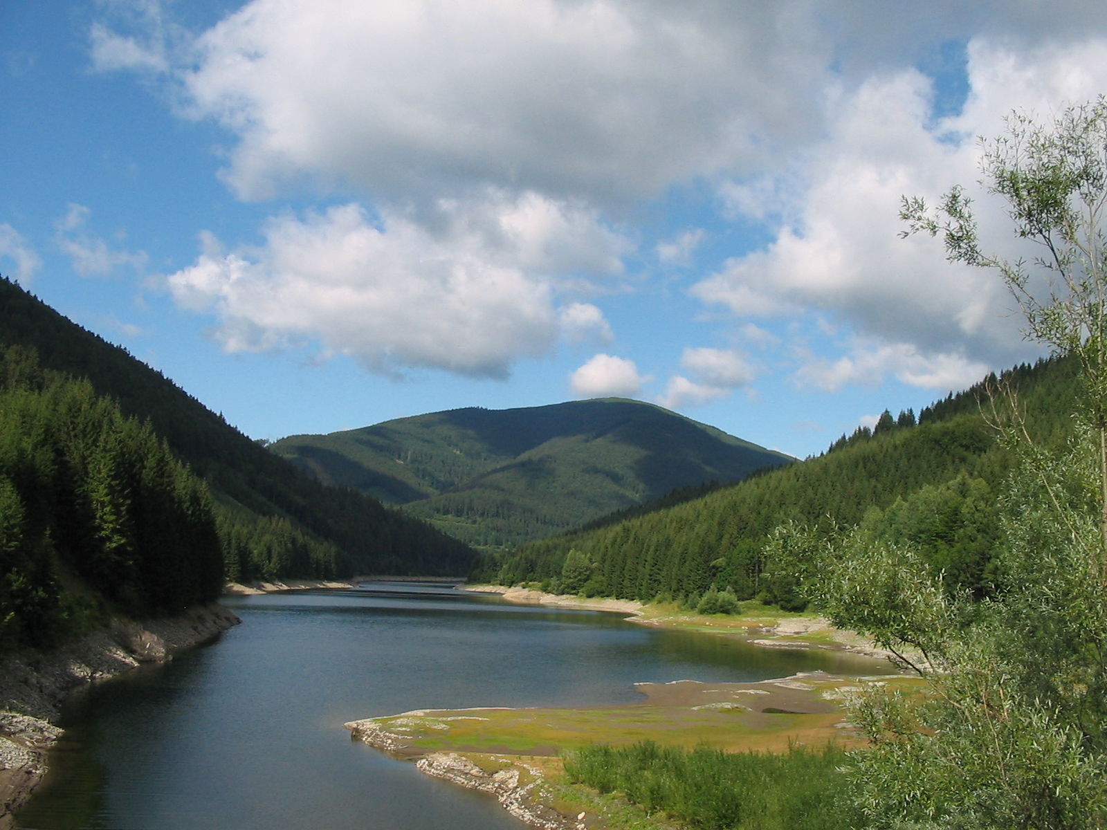 panorama masívu hory Smrk z Masarykova údolí.